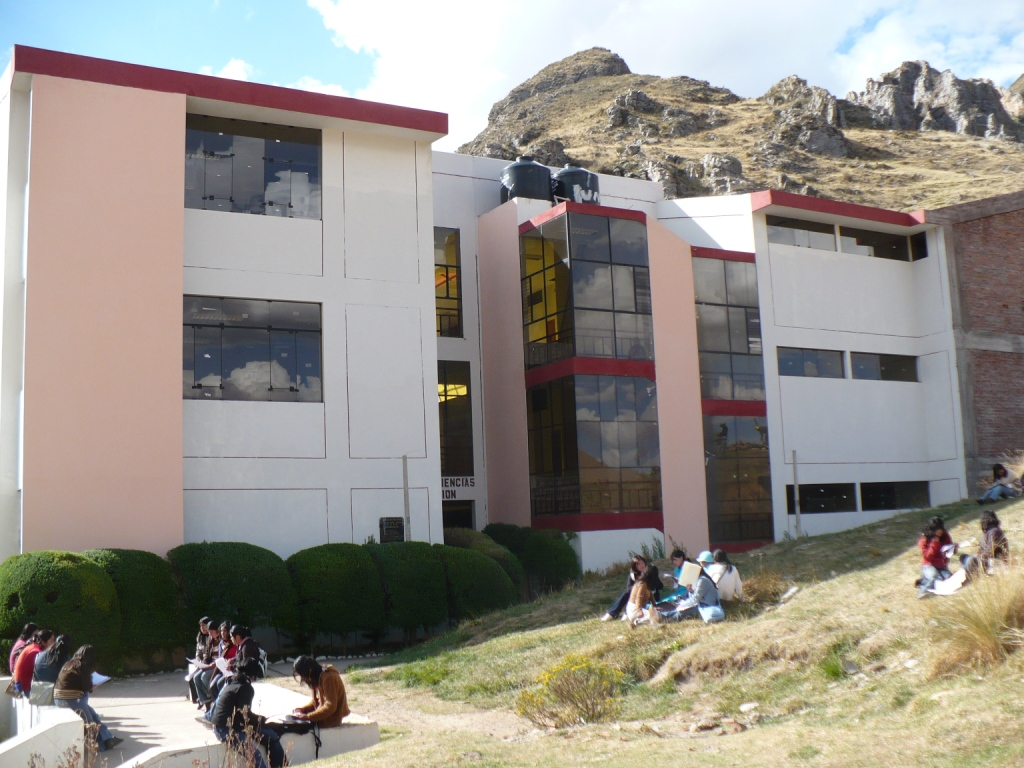 PABELLON DE LABOTARIO DE INGENIERIA ZOOTECNIA- FACULTAD DE CIENCIAS